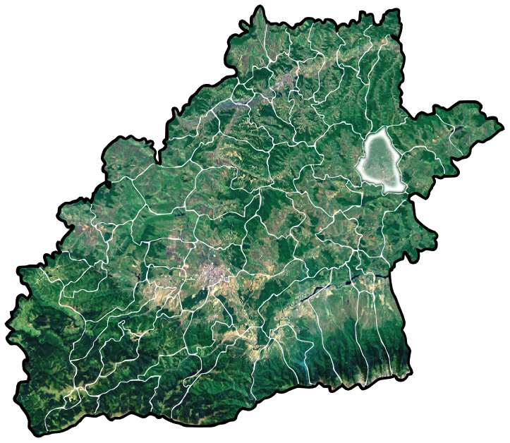 Agnita jud Sibiu.